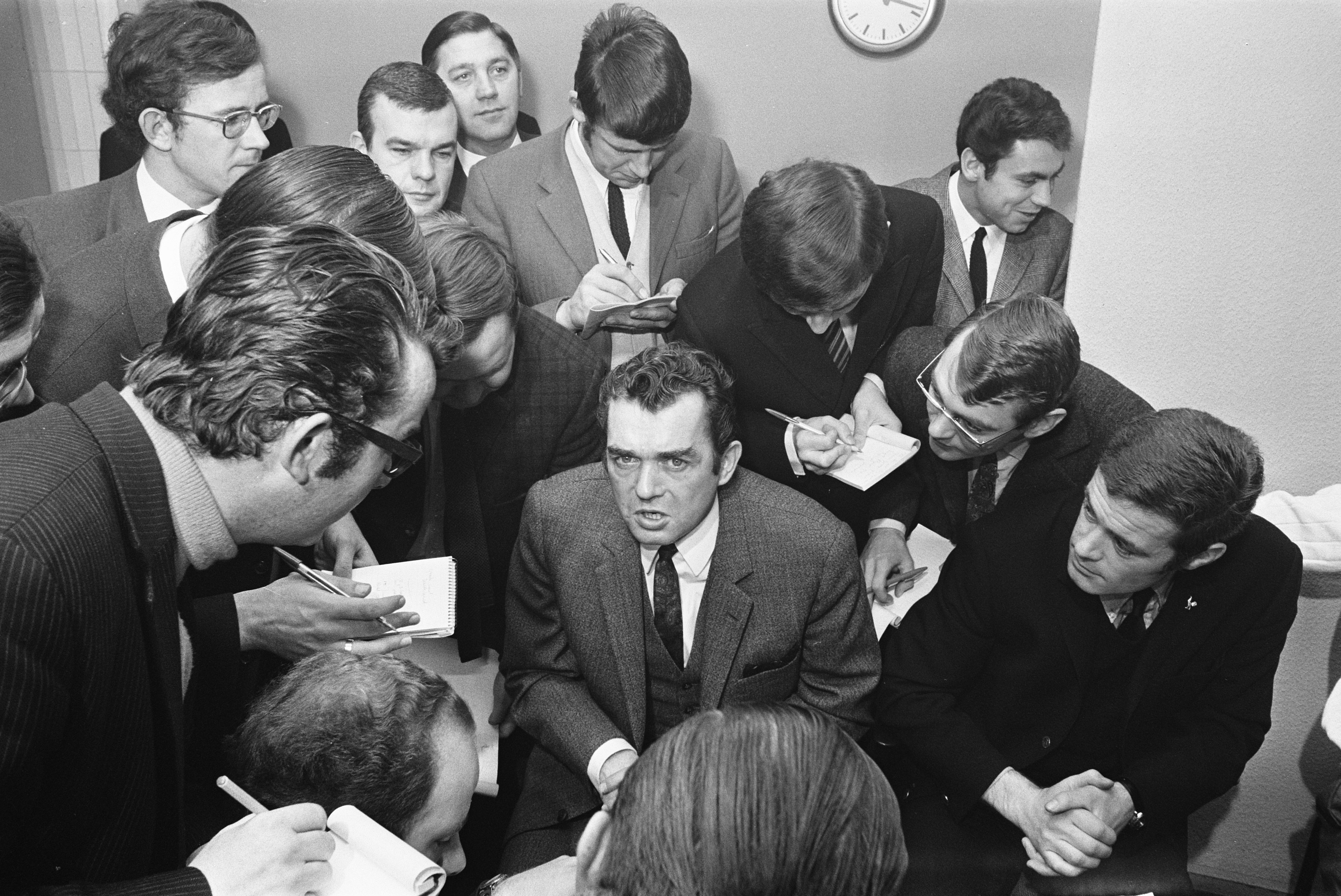 Collectie / Archief : Fotocollectie Anefo Reportage / Serie : [ onbekend ] Beschrijving : Loting in de kwartfinales voor de Europacup voetbal. Feyenoord lootte tegen Vorwarts Berlin (Oost-Duitsland). Trainer Ernst Happel spreekt met de pers Datum : 10 december 1969 Trefwoorden : journalisten, sport, trainers, voetbal Persoonsnaam : Happel, Ernst Instellingsnaam : Europacup, Feyenoord Fotograaf : Verhoeff, Bert / Anefo Auteursrechthebbende : Nationaal Archief Materiaalsoort : Negatief (zwart/wit) Nummer archiefinventaris : bekijk toegang 2.24.01.05 Bestanddeelnummer : 923-0644